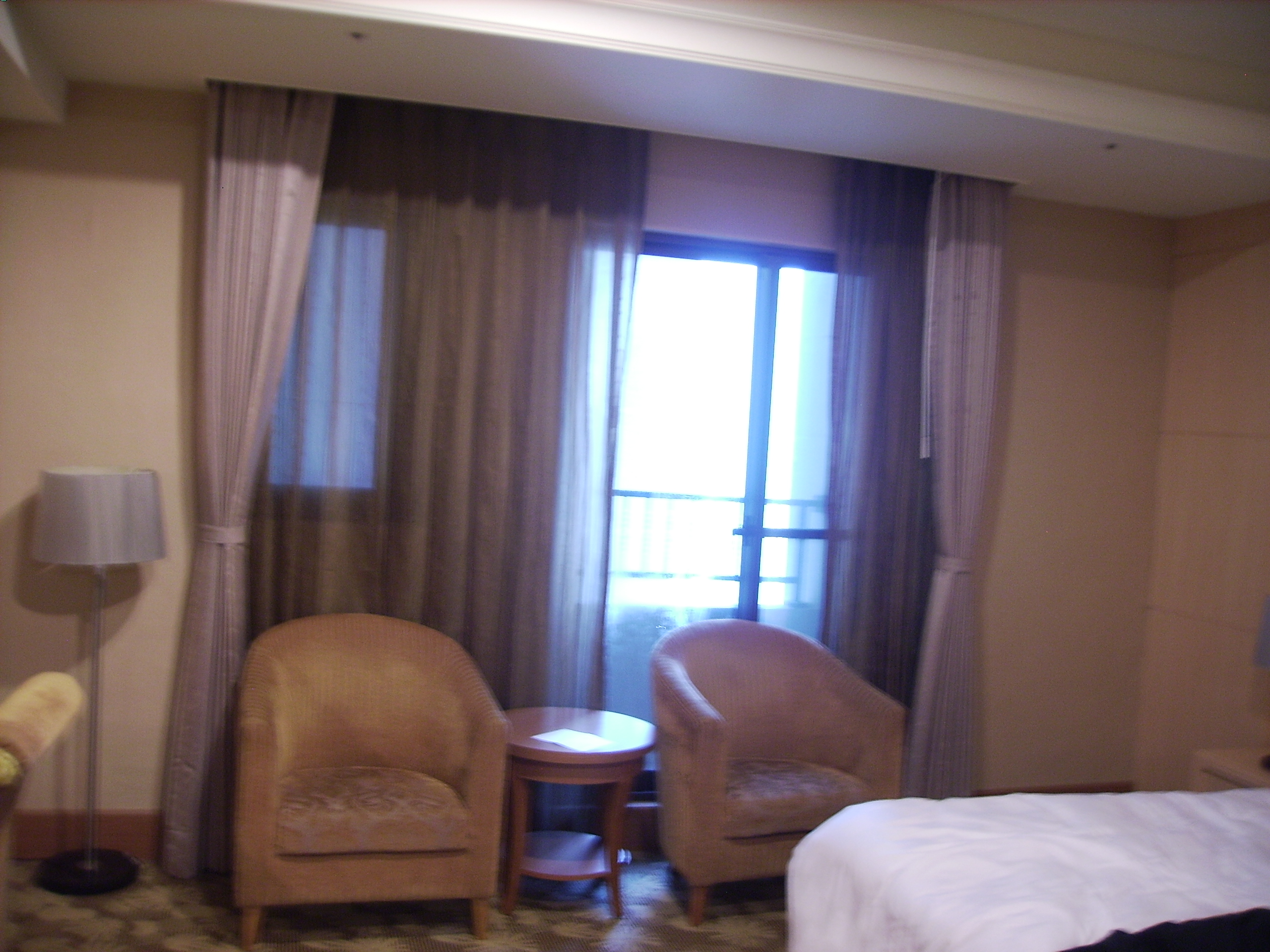 E-DA World 天悅房間-2